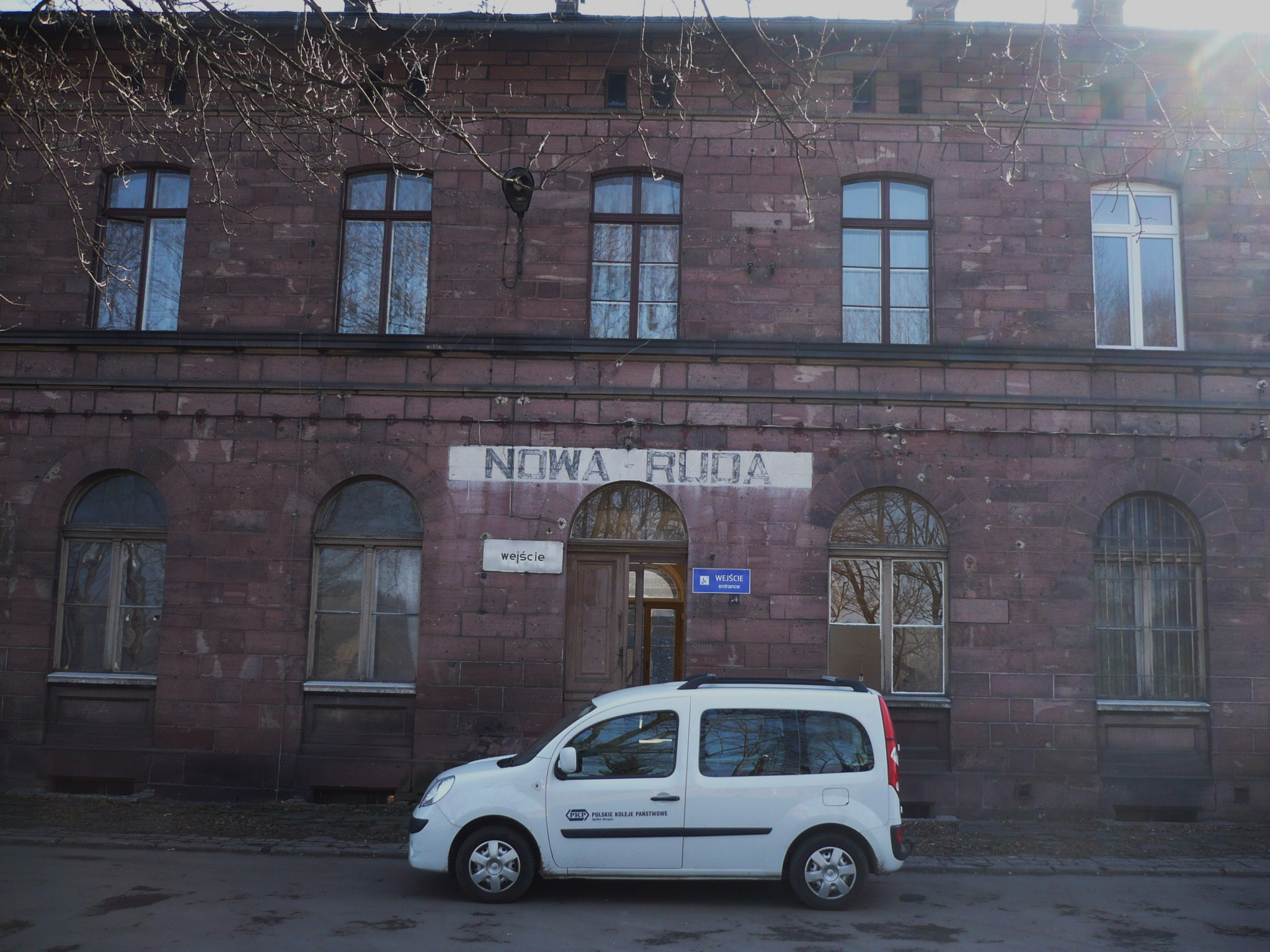 Nowa Ruda. Dworzec kolejowy